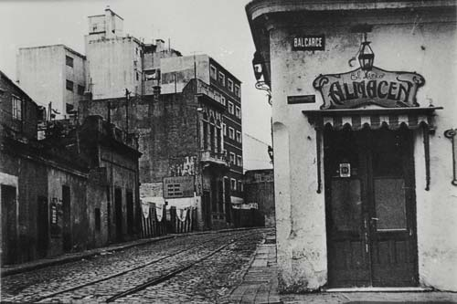 "El Viejo Almacén", restaurante dedicado al tango en el cruce de las calles Balcarce e Independencia, abierto en 1969. En 1979 Independencia fue ensanchada y transformada en avenida, pero el Viejo Almacén fue mantenido en pie.